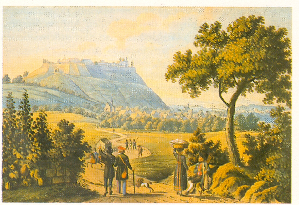 Festung Hohen Asperg auf dem Weg von dem Dorfe Möglingen Radierung, koloriert Ludwigsburg, Heimatmuseum, Inv.Nr. 12